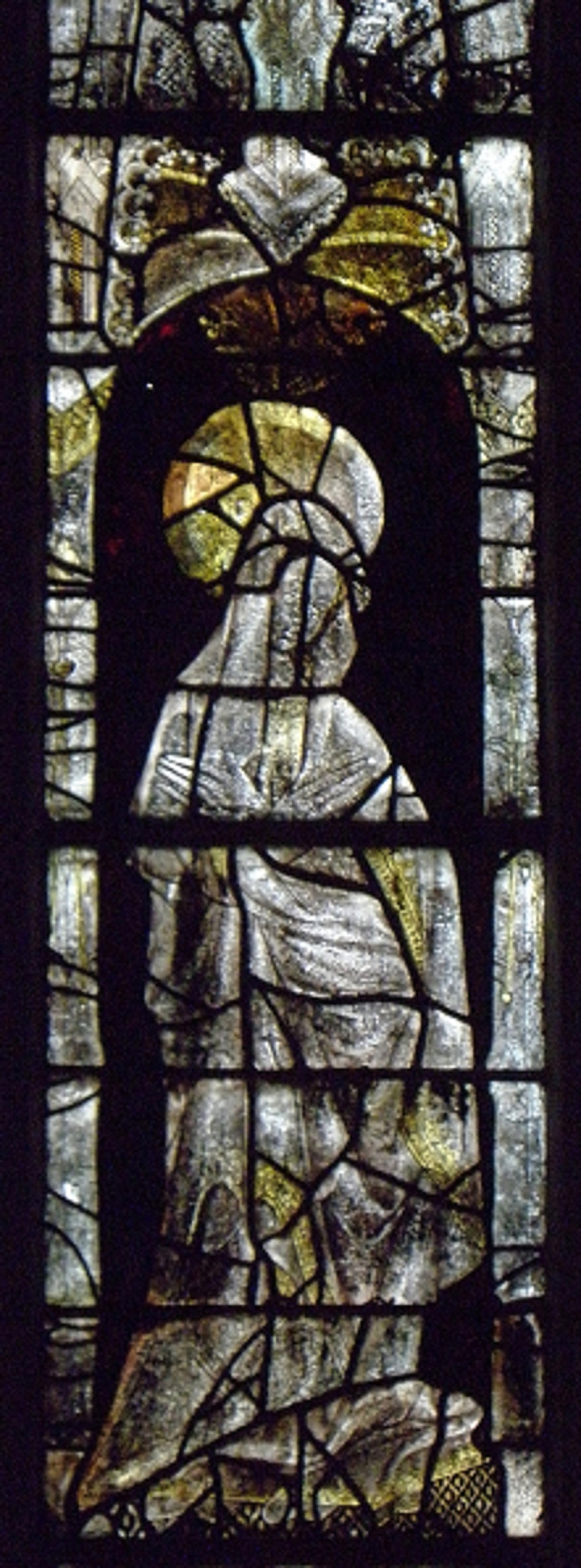 La Vierge. Maîtresse-vitre de l'église Notre-Dame de Runan (22).